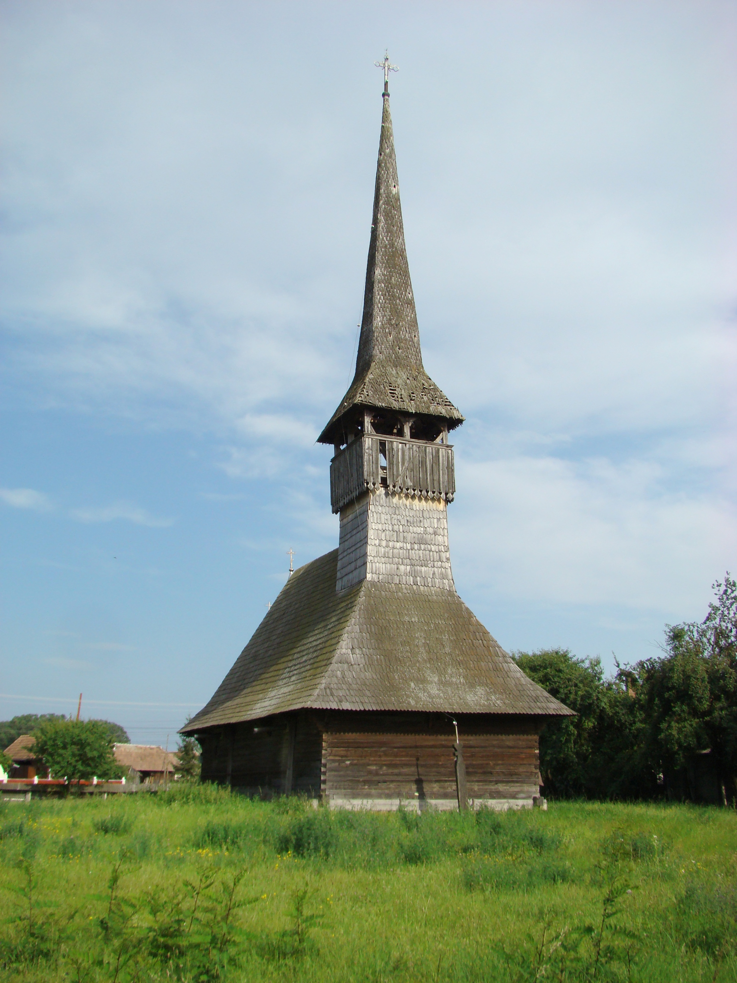 Biserica de lemn „Sfinții Arhangheli Mihail și Gavriil ” din Chețani, județul Mureș